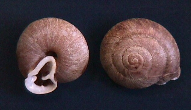 Labyrinthus umbrus / Lampadion umbrus